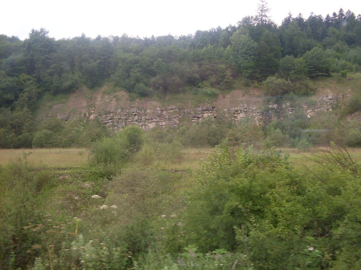 Dawny kamieniołom w Komańczy. Kamień z niego wykorzystywano do budowy linii kolejowej 107.